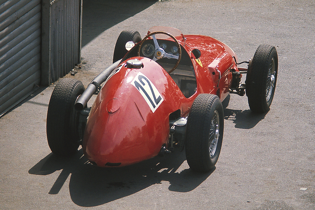 Ferrari Formel 2, Bj. 1953, mit 4-Zylinder-Motor, 2500 cm³, für die Formel 1 ab 1954 beim Oldtimer-Grand-Prix auf dem Nürburgring